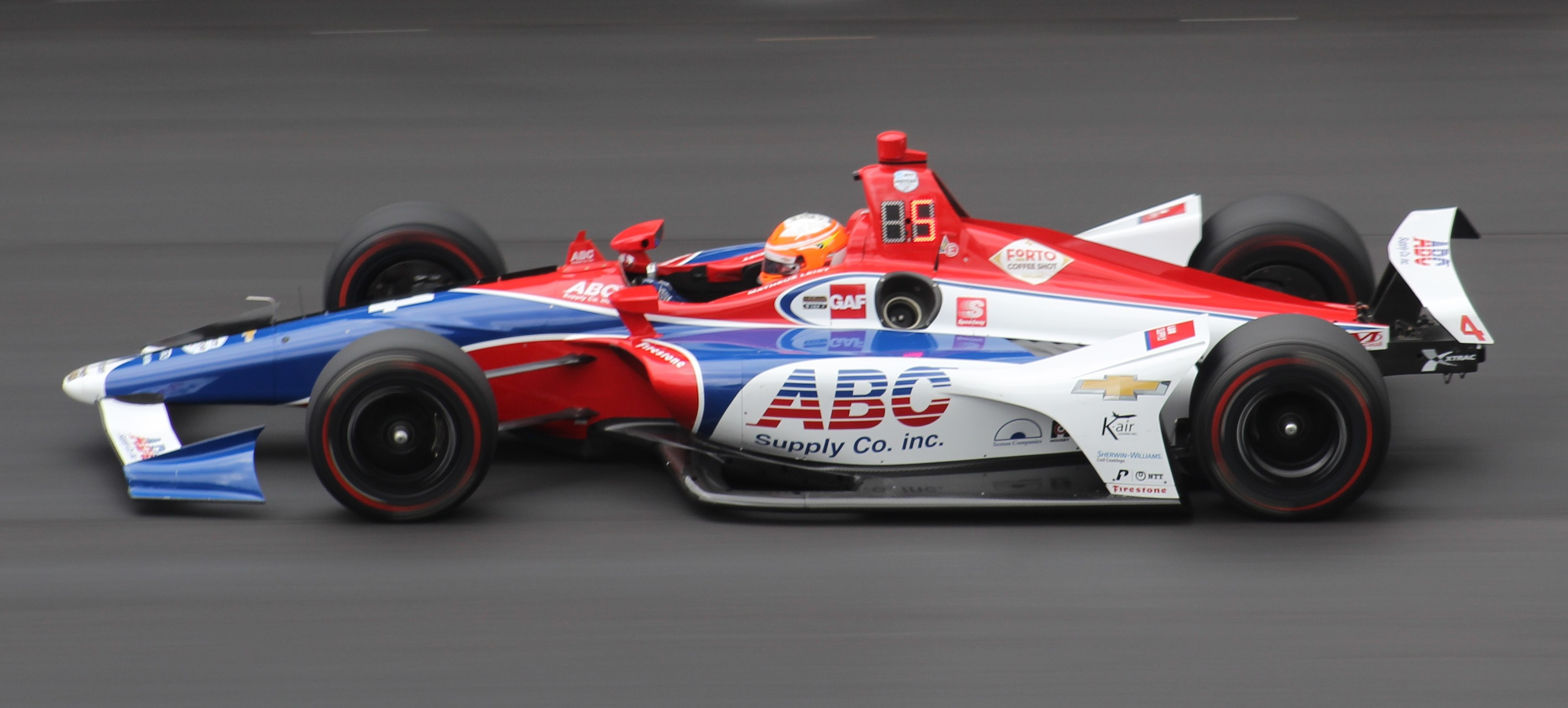 2019 Indianapolis 500